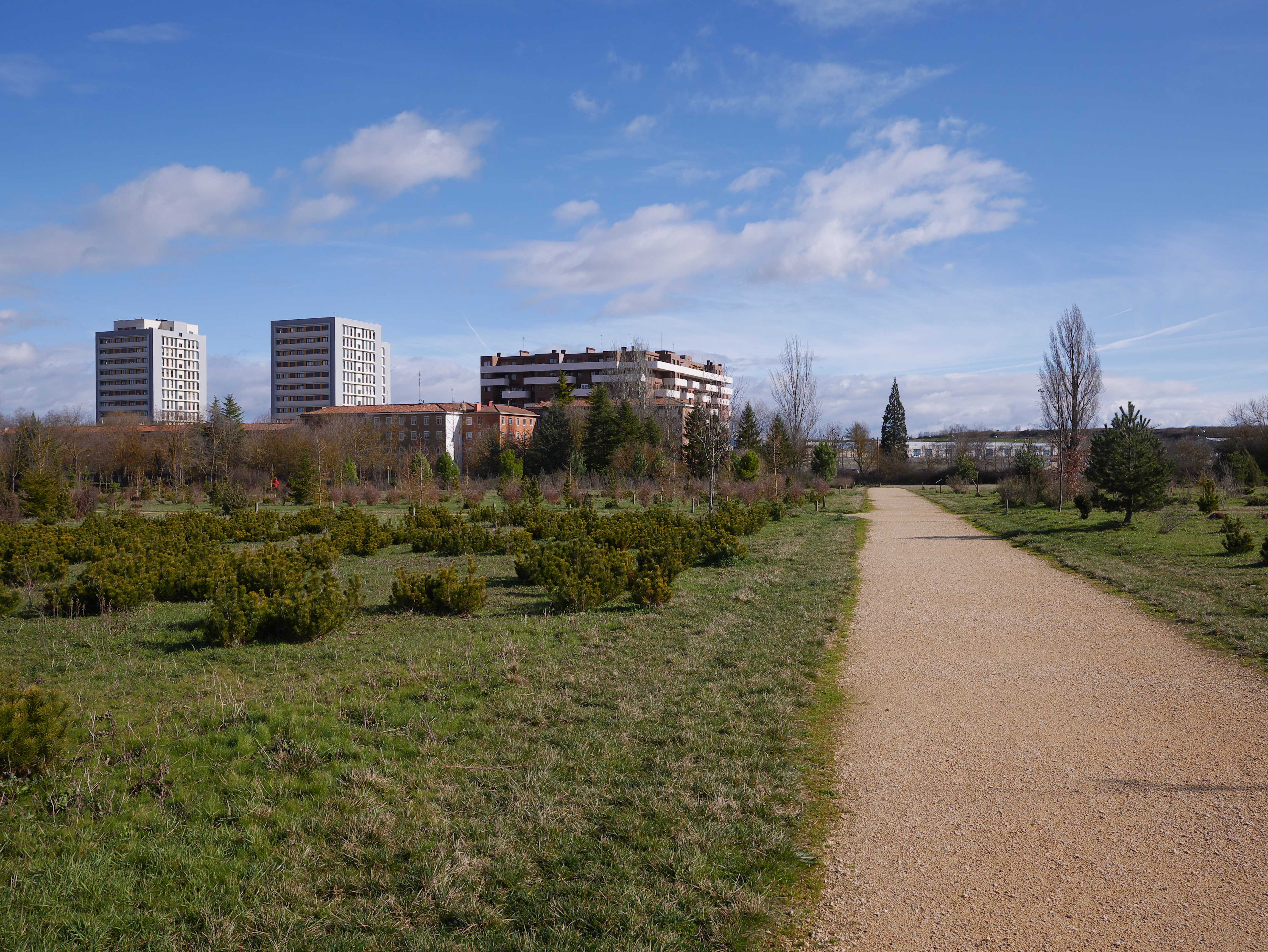 Jardín Botánico de Olárizu, coníferas. Vitoria-Gasteiz, Álava, País Vasco, España